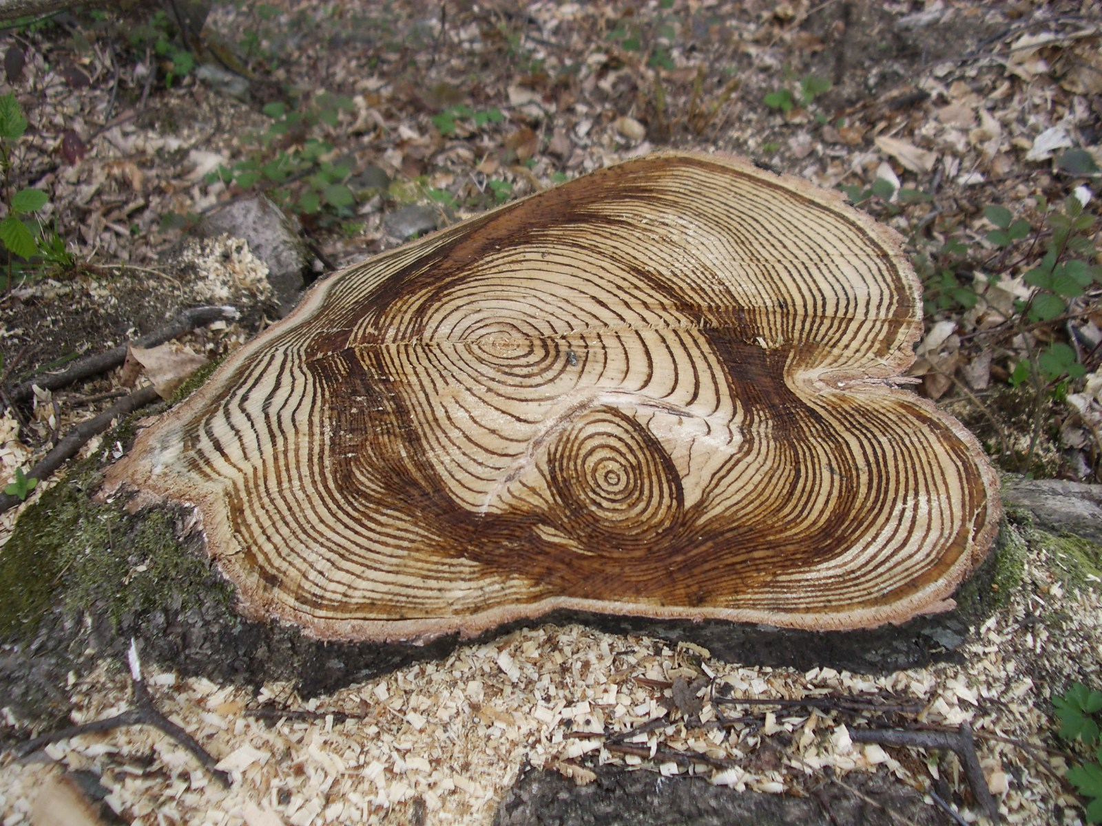 Valle Verzasca, Switzerland self-made, May 2006